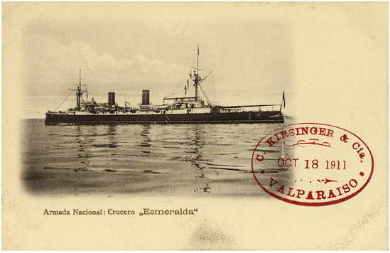 CRUCERO "ESMERALDA" (4°) Lanzado al agua el 04.06 1895